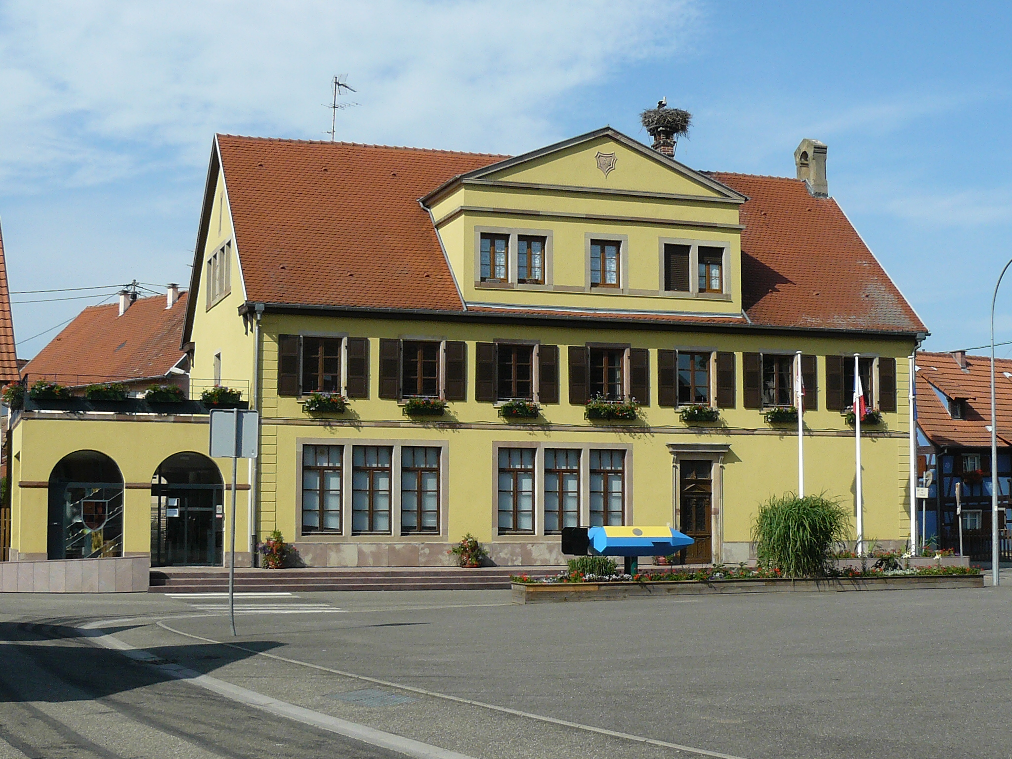 Mairie de Duttlenheim